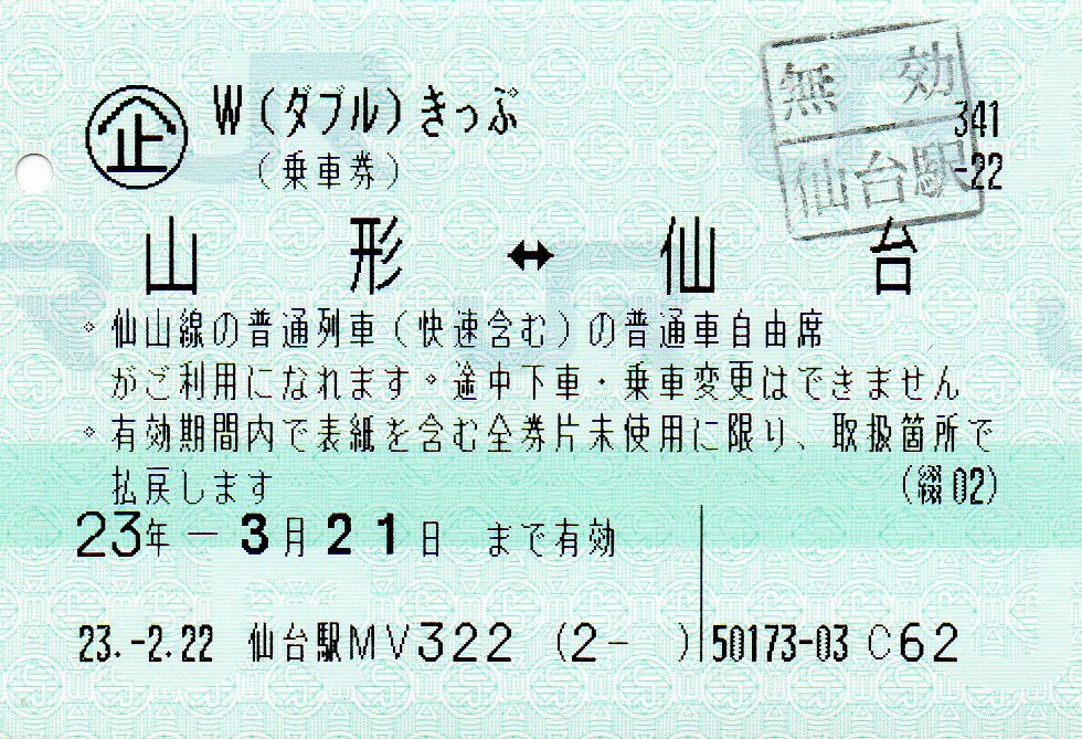 Wきっぷ山形～仙台（マルスでの発行例） 2011年2月22日使用